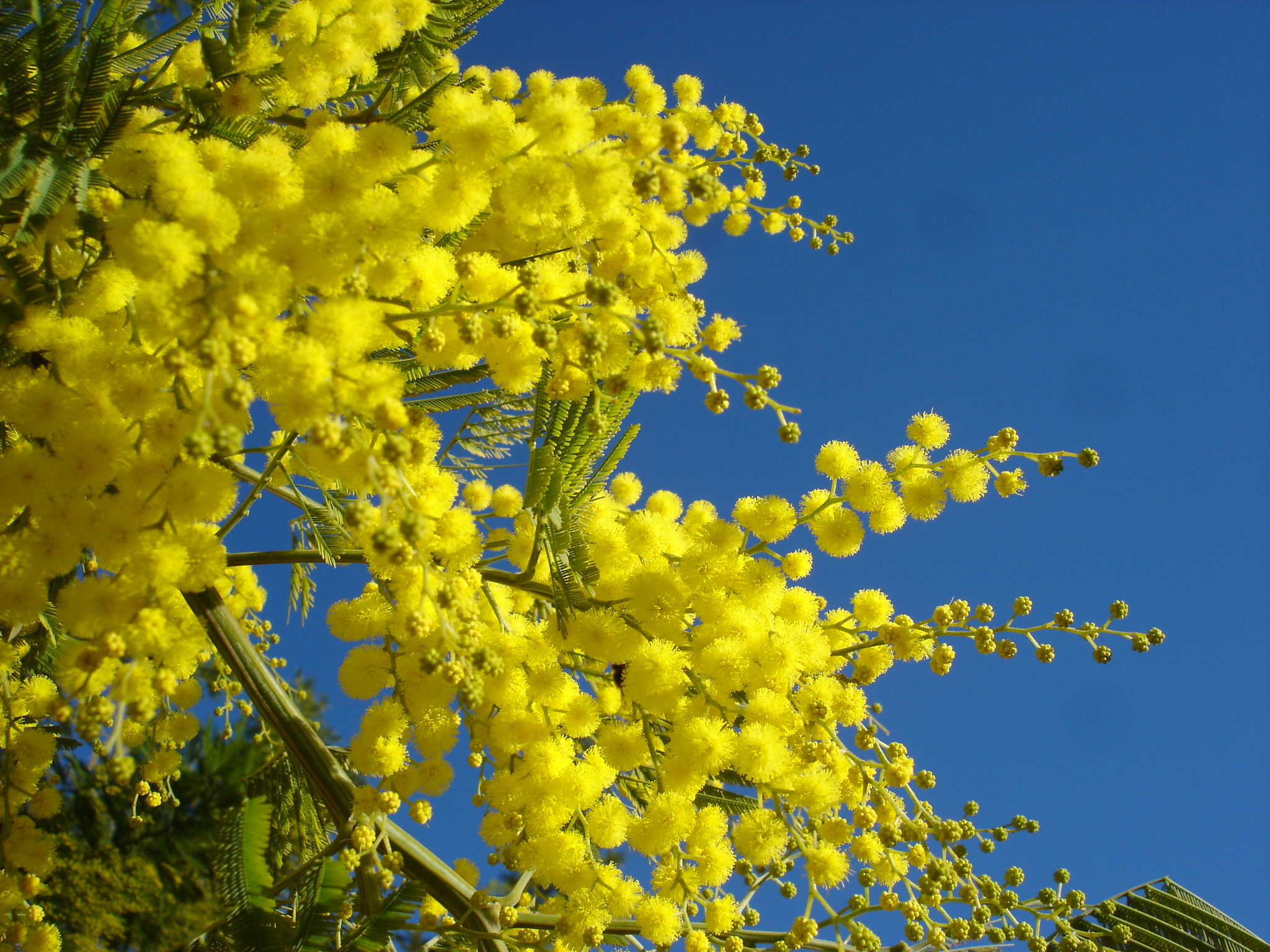 Acacia dealbata